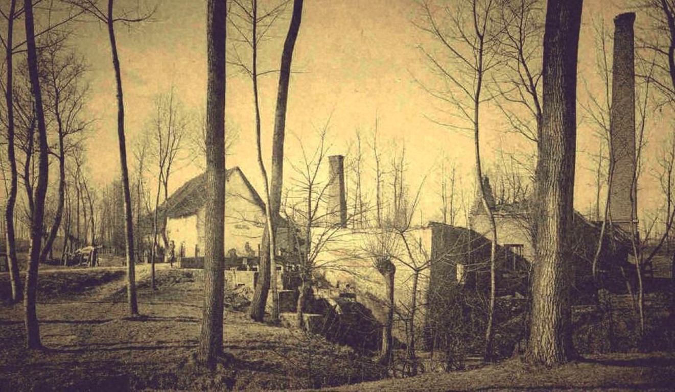 De Loddershoekmolen